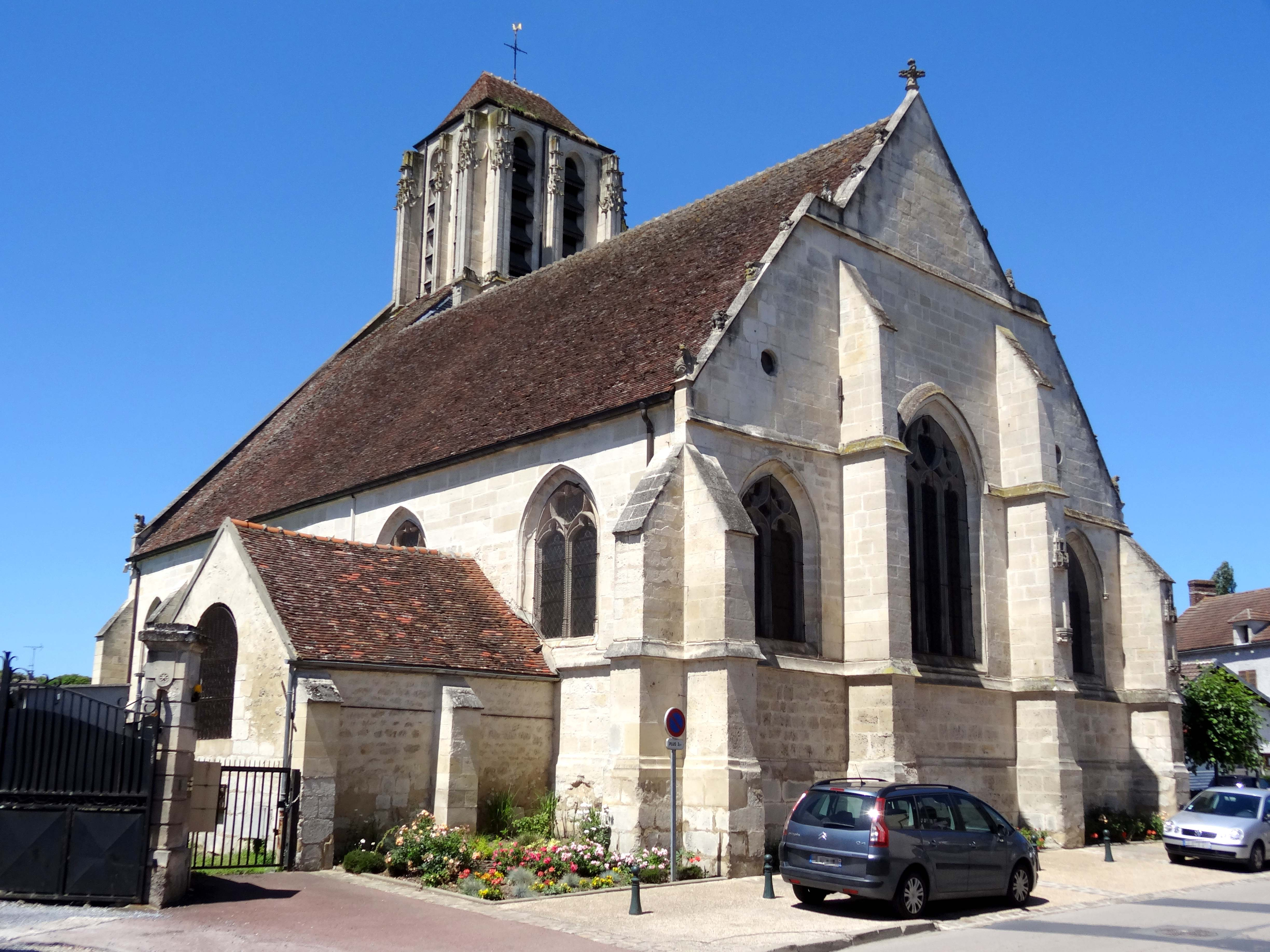 Église Saint-Michel du Mesnil-en-Thelle - voir titre.